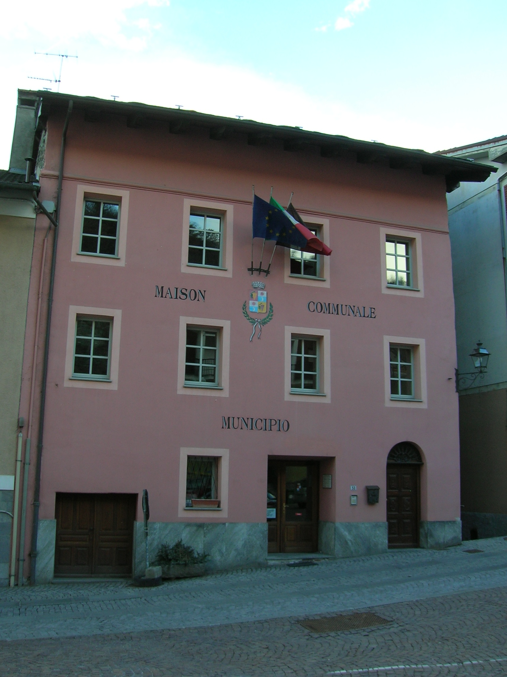 municipio di Chambave, Valle d'Aosta, Italia.